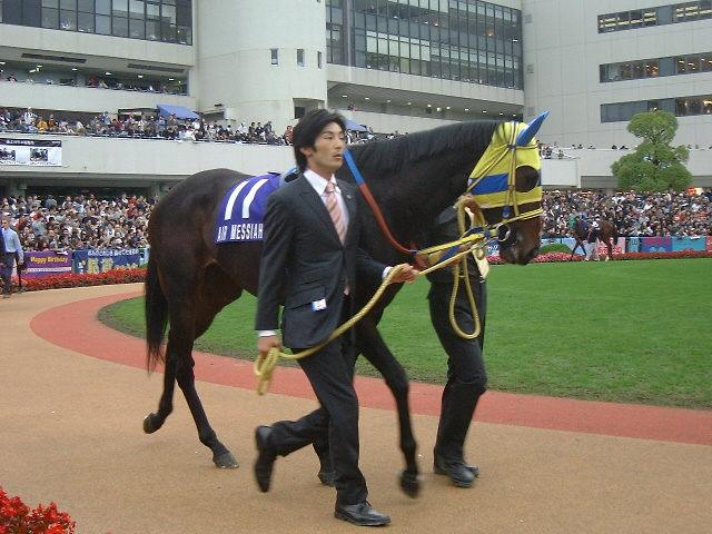 エアメサイア